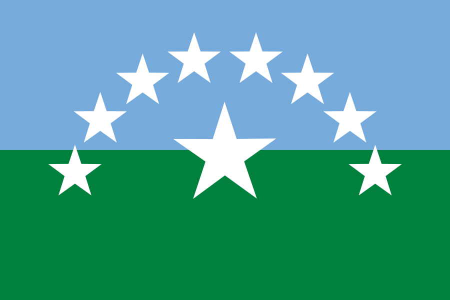 Bandera de Muisne